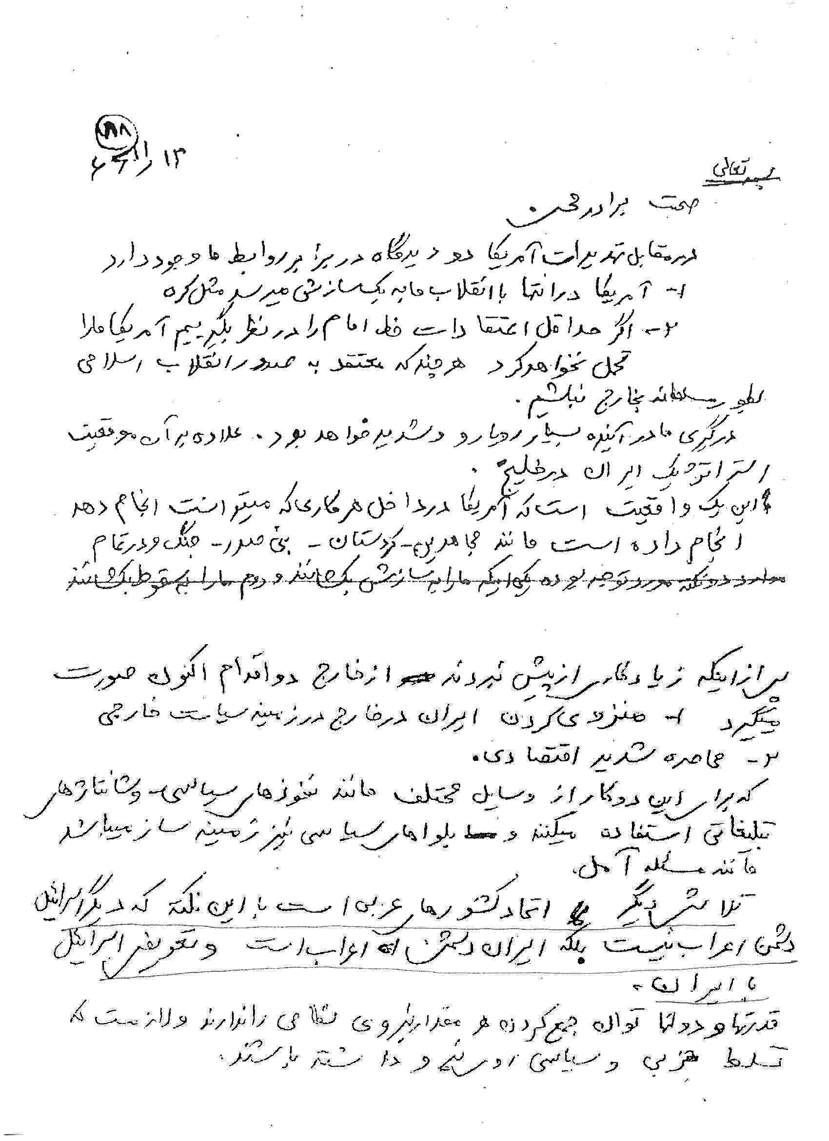 دست‌نوشته تاریخی شهید حسن باقری از پیش‌بینی تحریم‌های اقتصادی آمریکا علیه ایران از صحبت های فرمانده وقت جنگ ایران و عراق محسن رضایی